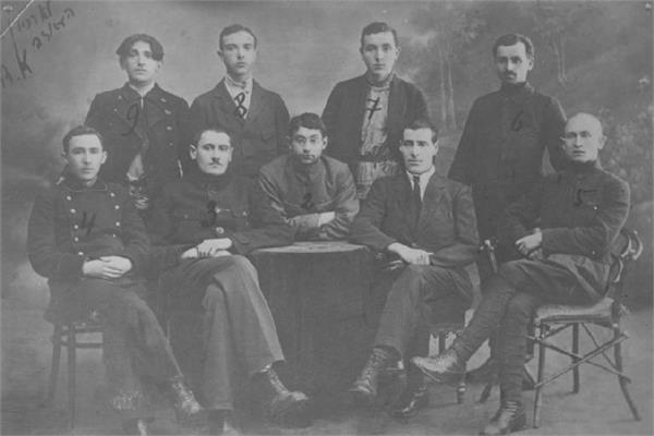 יוסף טרומפלדור וחברים